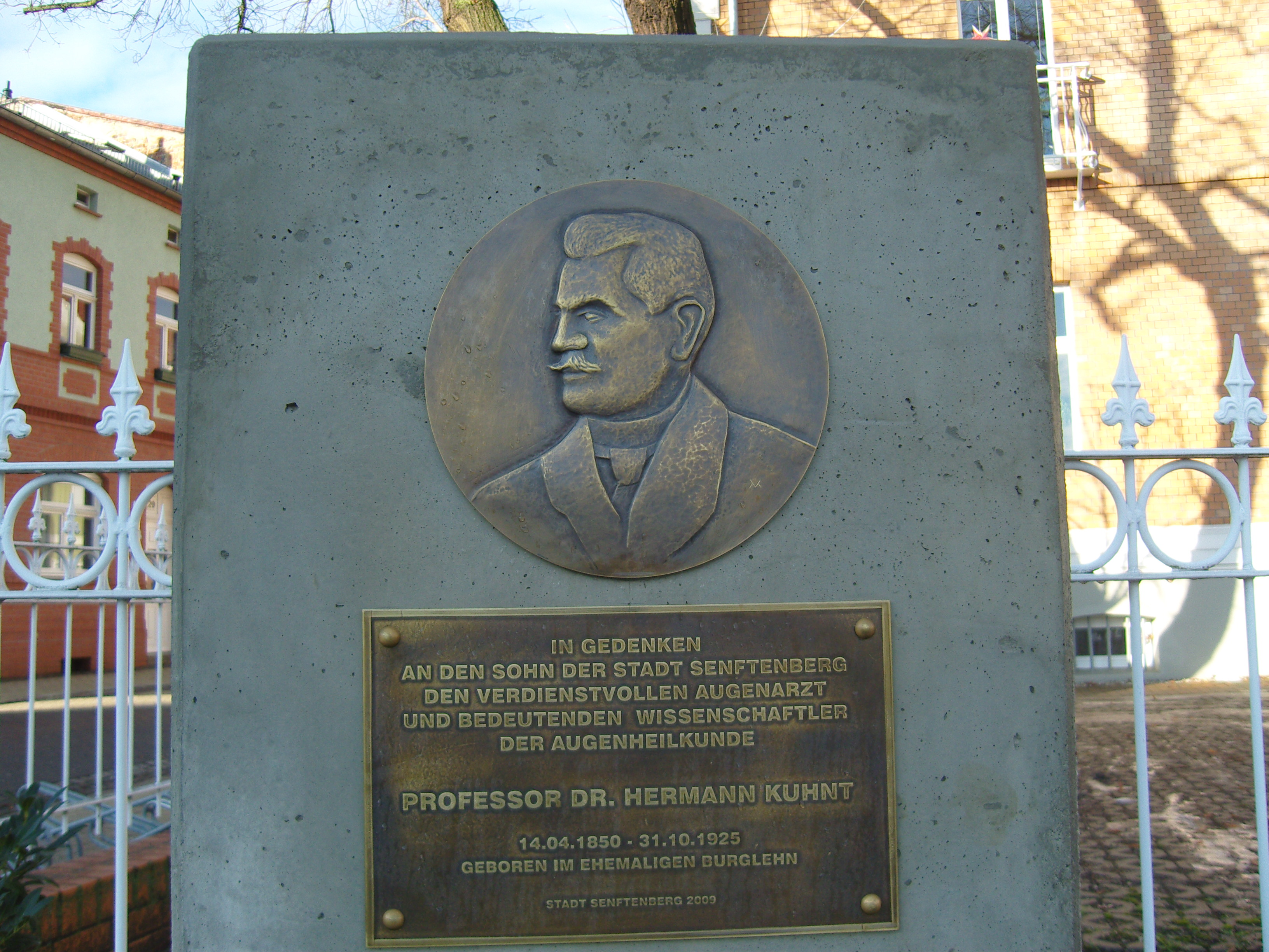 Denkmal für den Augenarzt Hermann Kuhnt in Senftenberg